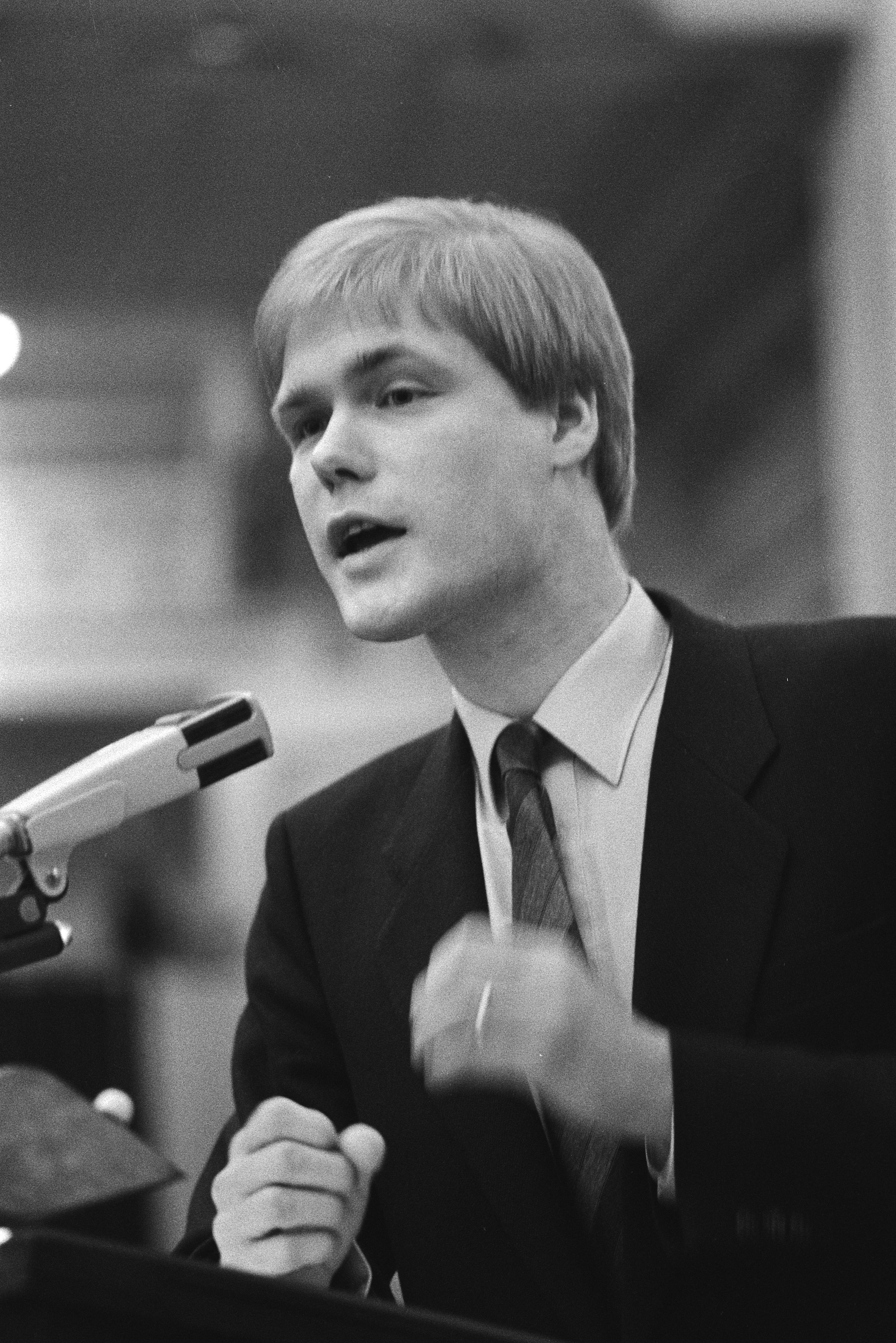 Collectie / Archief : Fotocollectie Anefo Reportage / Serie : Behandeling van de begroting 1983 van Sociale Zaken en Werkgelegenheid in de Tweede Kamer Beschrijving : R.L.O. Linschoten (VVD) aan het woord Datum : 16 maart 1983 Locatie : Den Haag, Zuid-Holland Trefwoorden : overheidsbegrotingen, parlementaire debatten, parlementariërs, politiek, portretten Persoonsnaam : Linschoten, Robin Instellingsnaam : Tweede Kamer, VVD Fotograaf : Antonisse, Marcel / Anefo Auteursrechthebbende : Nationaal Archief Materiaalsoort : Negatief (zwart/wit) Nummer archiefinventaris : bekijk toegang 2.24.01.05 Bestanddeelnummer : 932-5337